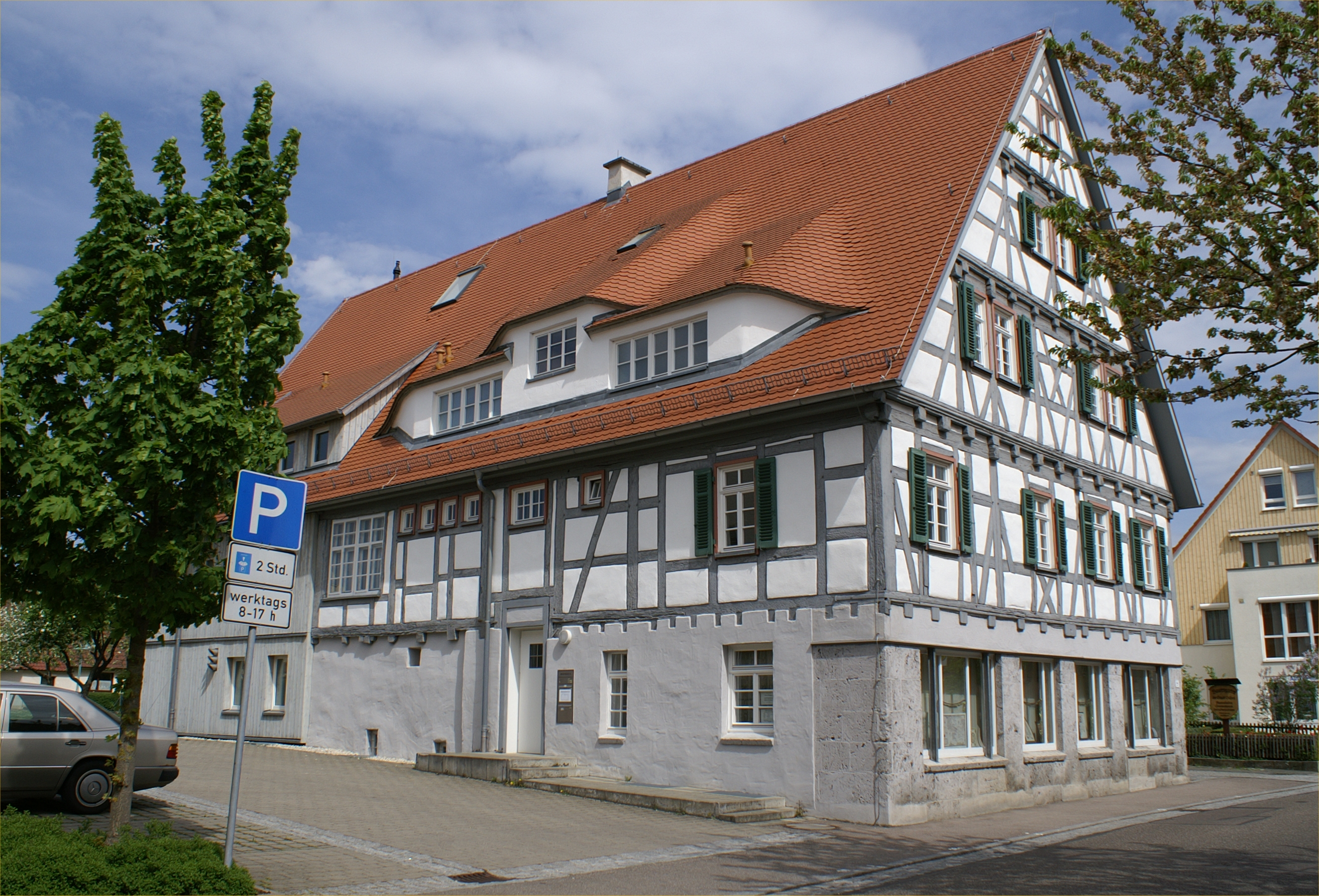 Die Musikschule in Süßen befindet sich in einem renovierten historischen Gebäude.